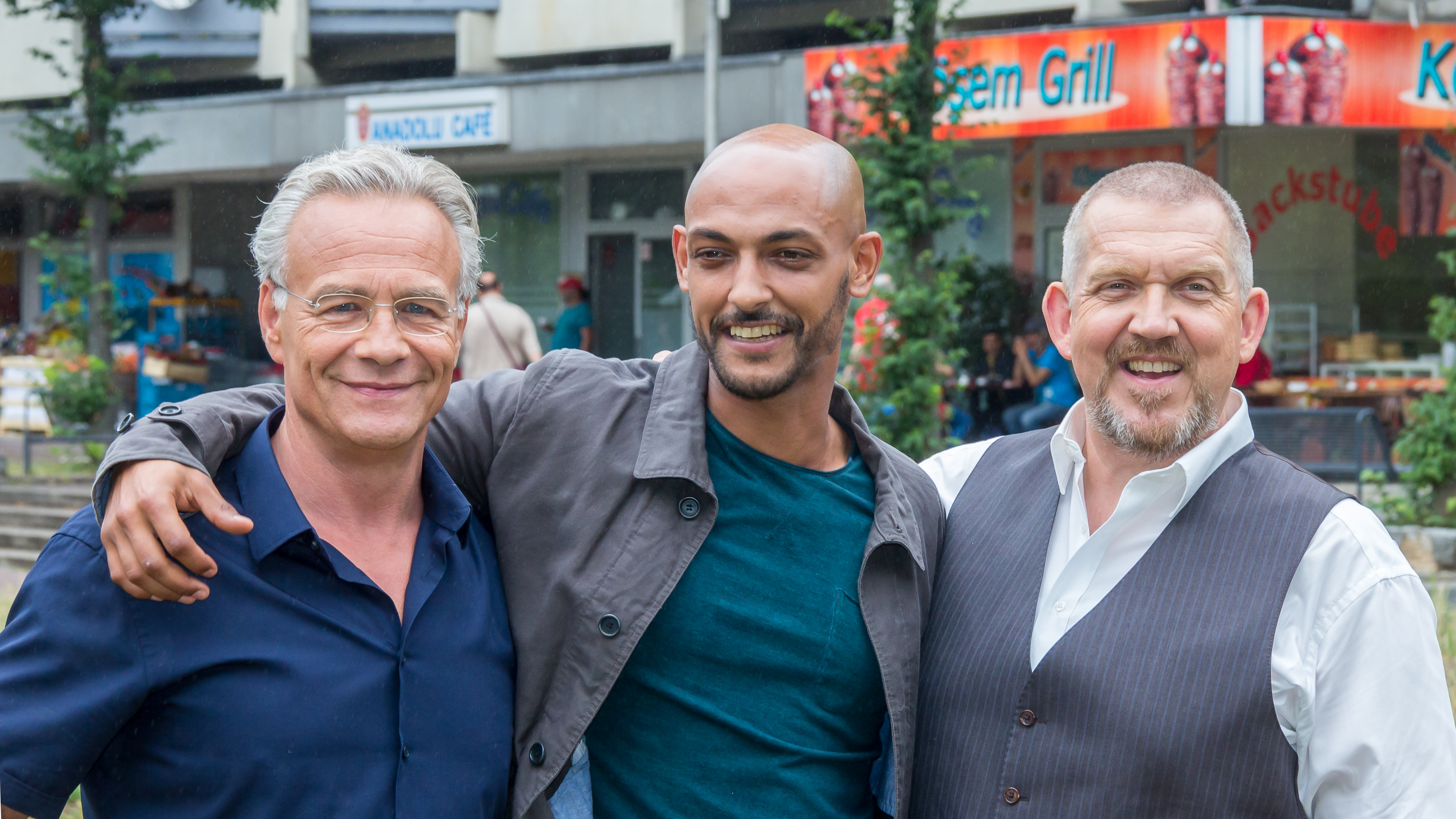 WDR-Dreharbeiten zu Tatort Köln „Kartenhaus“ Gruppenfoto: Klaus J. Behrendt in der Rolle des Tatort-Kommissars „Max Ballauf“, Patrick Abozen in der Rolle des Assistenten „Tobias Reisser“ und Dietmar Bär in der Rolle des Tatort-Kommissars „Freddy Schenk“